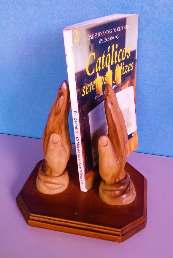 Mão de madeira com livro do Padre Zezinho, um sacerdote católico e cantor brasileiro.